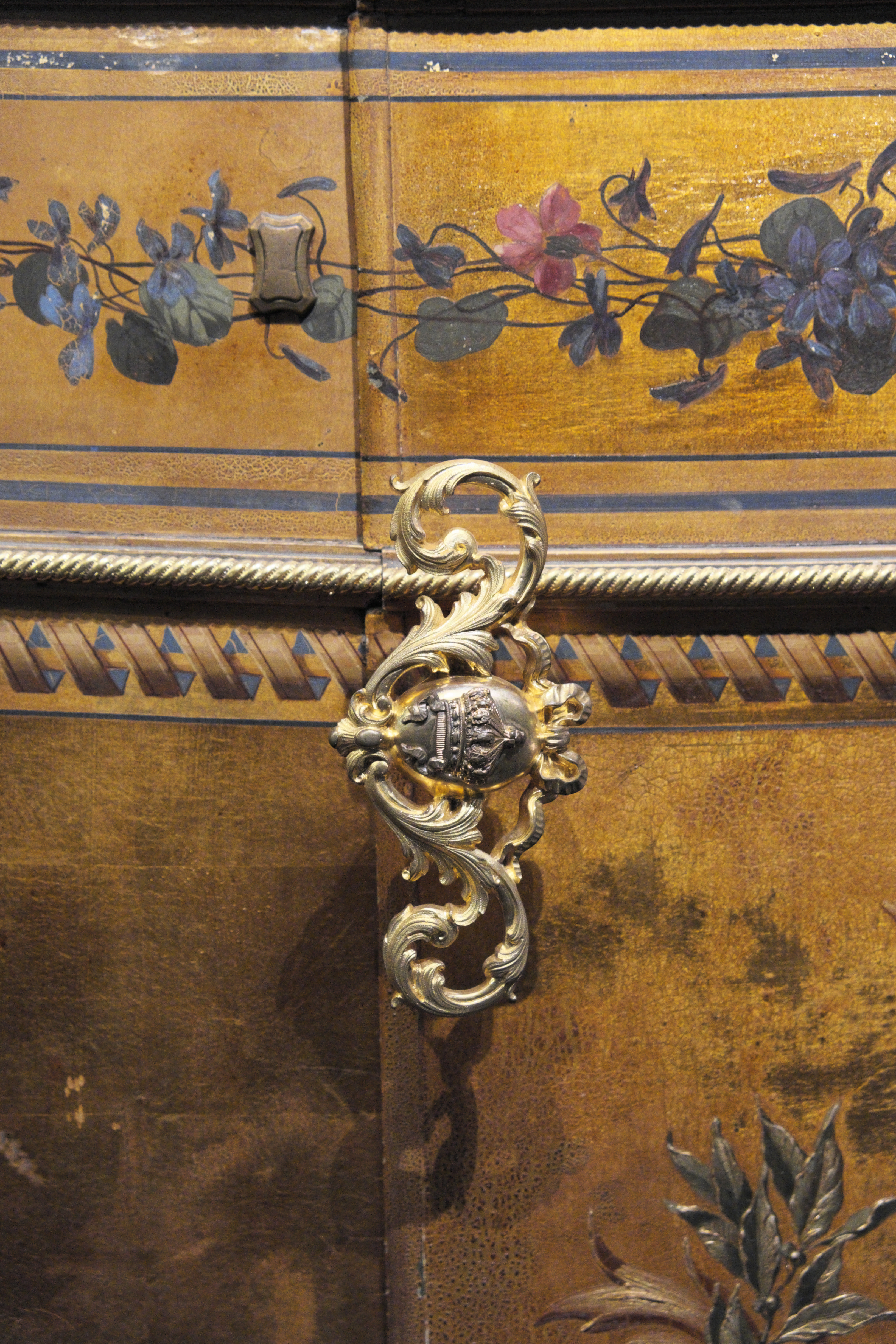 Kutschenmuseum, Galerie des Carosses, in der Grande Écurie des Schlosses von Versailles im Département Yvelines (Region Île-de-France/Frankreich).